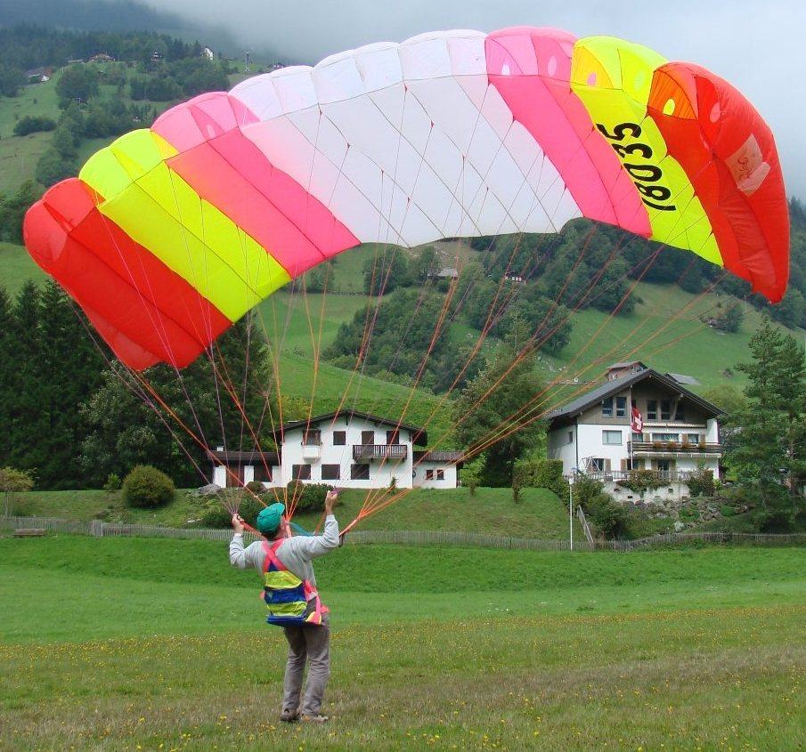 Paraglider from 1988